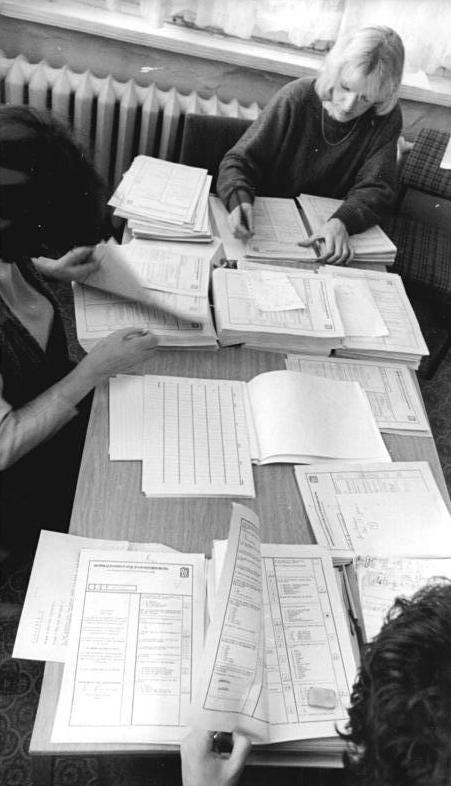 Zentralinstitut für Jugendforschung, Auswertung von Fragebögen ADN-ZB Grubitzsch 16.1.1989-pr-Leipzig: Jugendforschung. Die erste repräsentative, aus 35 Punkten bestehende Meinungsumfrage wurde kürzlich vom Zentralinstitut für Jugendforschung zur Veröffentlichung vorbereitet. Sie wurde gemeinsam mit dem Institut für Marktforschung durchgeführt und umfaßt u.a. Fragen nach Vertrauen zu Politikern, der künftigen Gesellschaftsordung und Reisemöglichkeiten. Mitarbeiter aus dem Zentralinstitut sichten Fragebögen. Siehe auch 1989/1206/18N